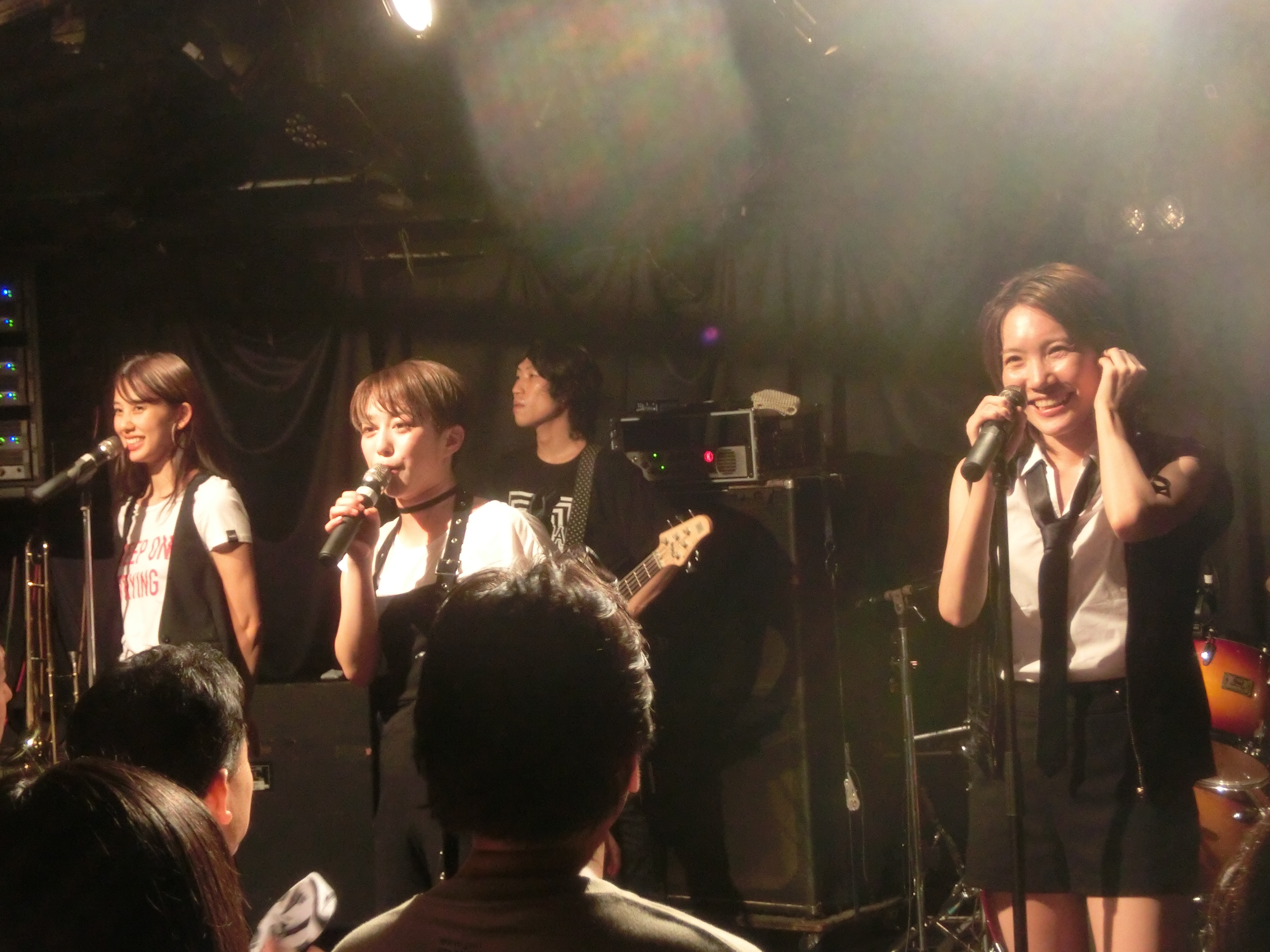 トライシグナル（2018年、渋谷）